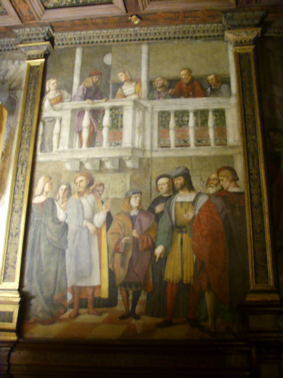 7 Girolamo Tessari, Miracolo del bicchiere di vetro